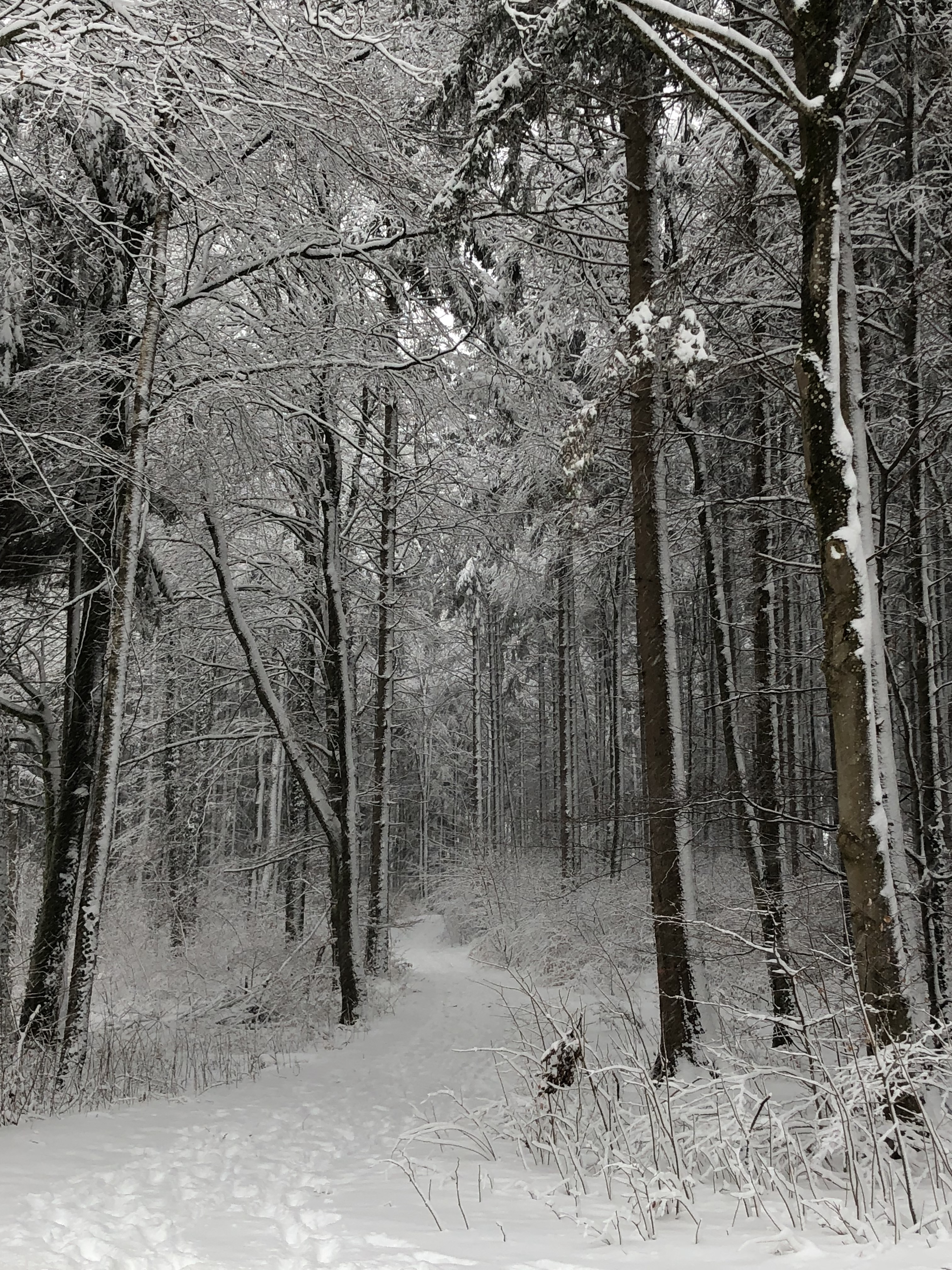 Jungfernberg (694m) in Dießen am Ammersee, Weg zum Gipfel, Markt Dießen am Ammersee, Landkreis Landsberg am Lech, Bayern, DE, Blick von Norden